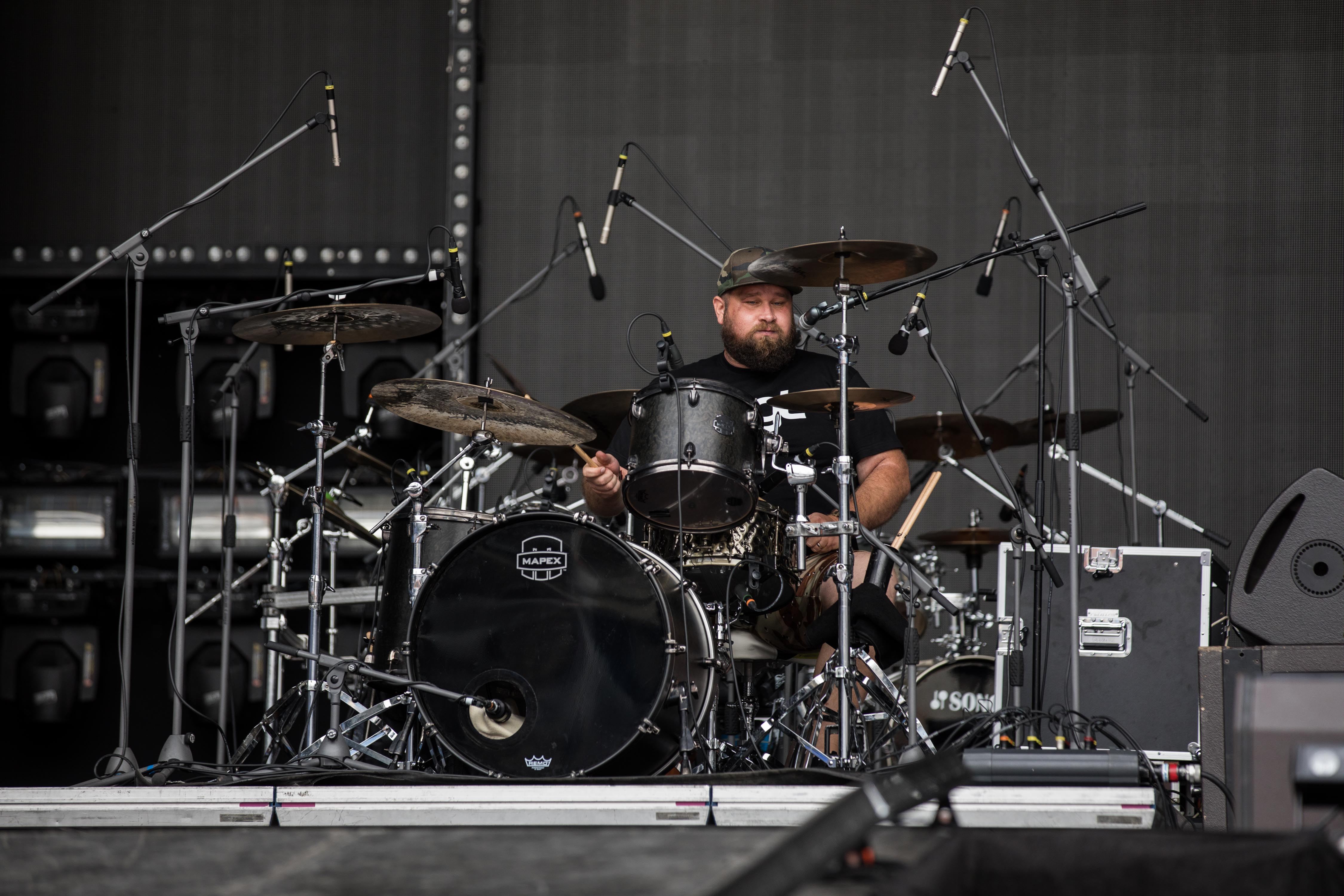 Dodo Praženec